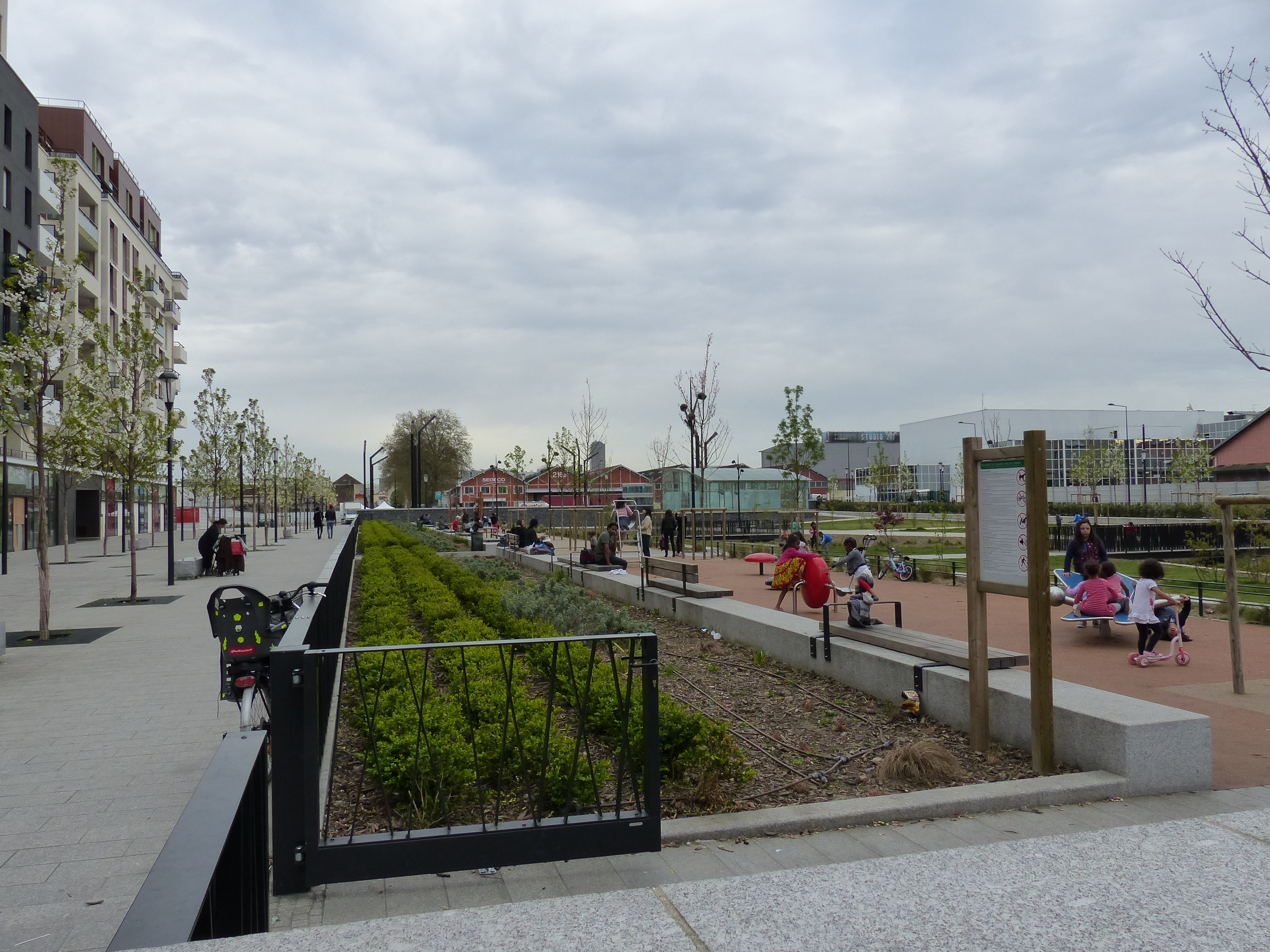 Jardin public de la Place du Front-Populaire (Saint-Denis / Aubervilliers)